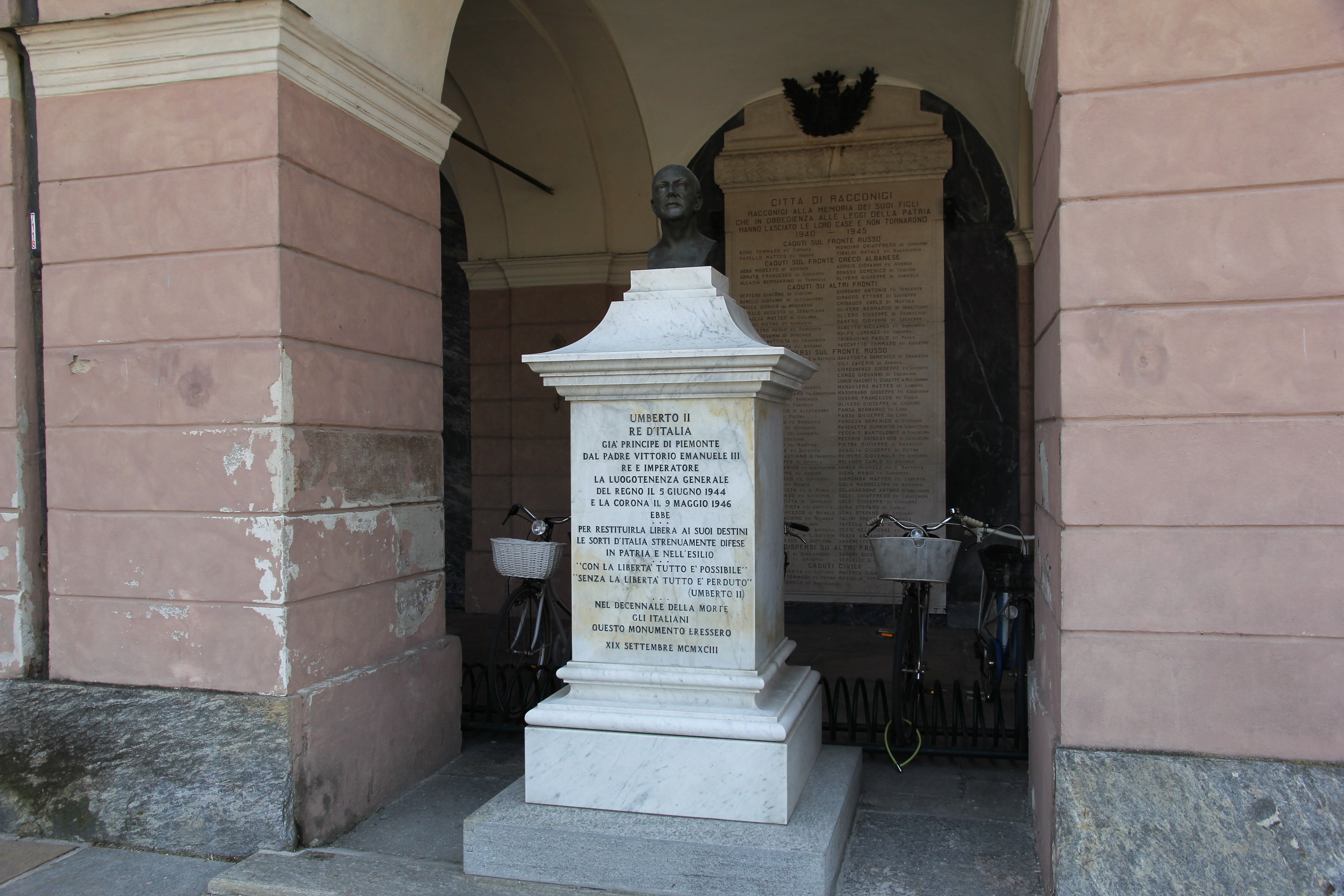 Racconigi, chiesa di Santa Maria Maggiore